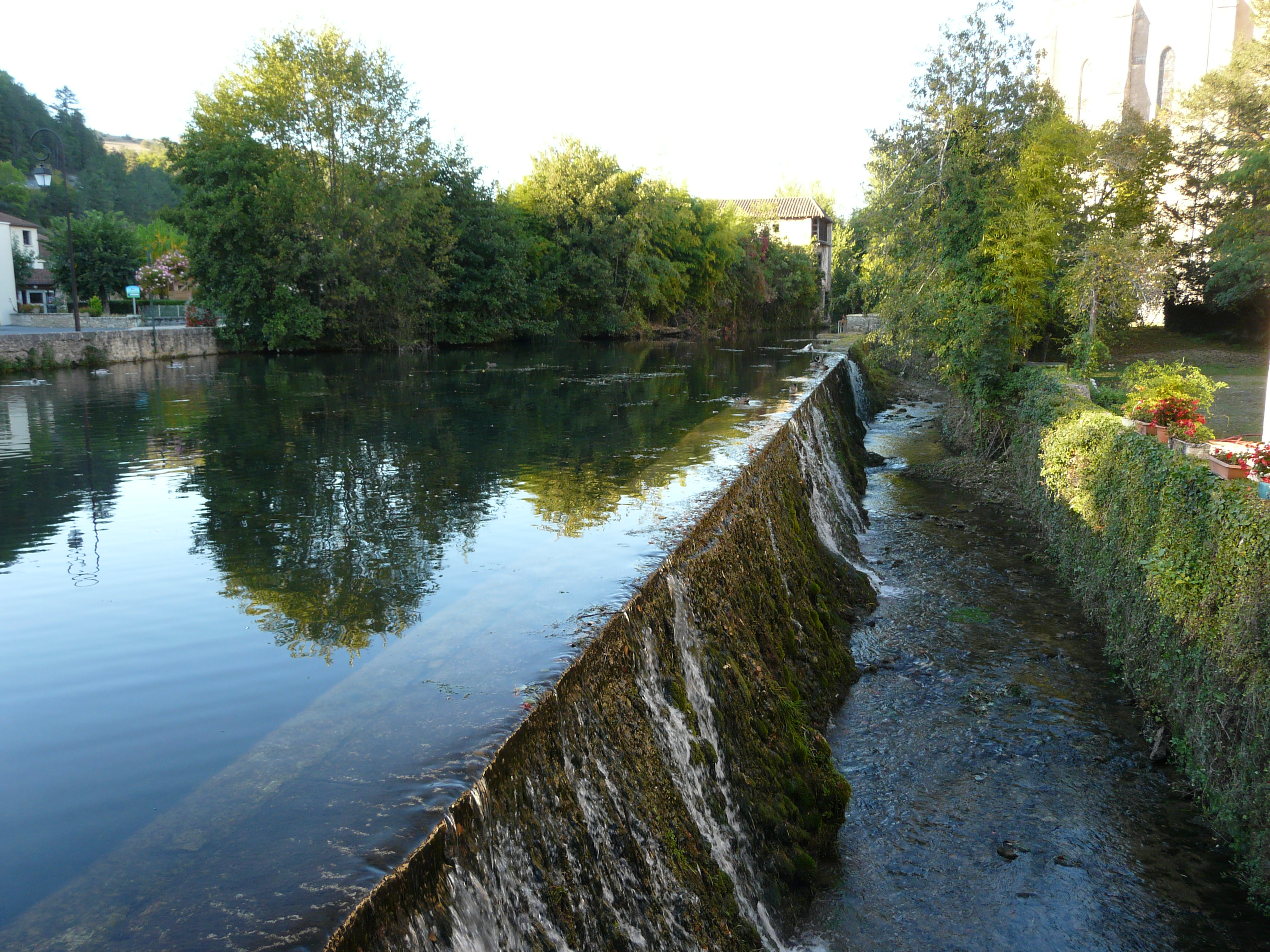 La retenue du ruisseau de Ladouch dans la partie nord de la ville du Bugue, Dordogne, France.